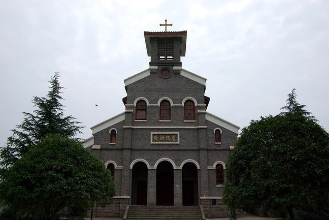 重庆江北圣德肋撒堂。